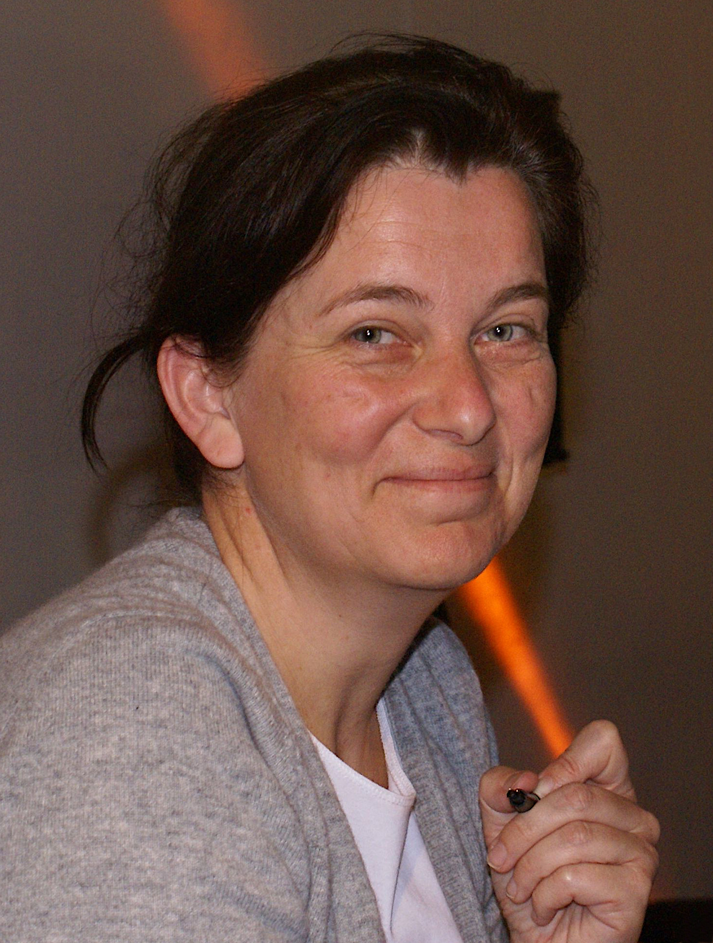 Andrea Maria Schenkel bei einer Lesung in Emsdetten am 12.4.2008